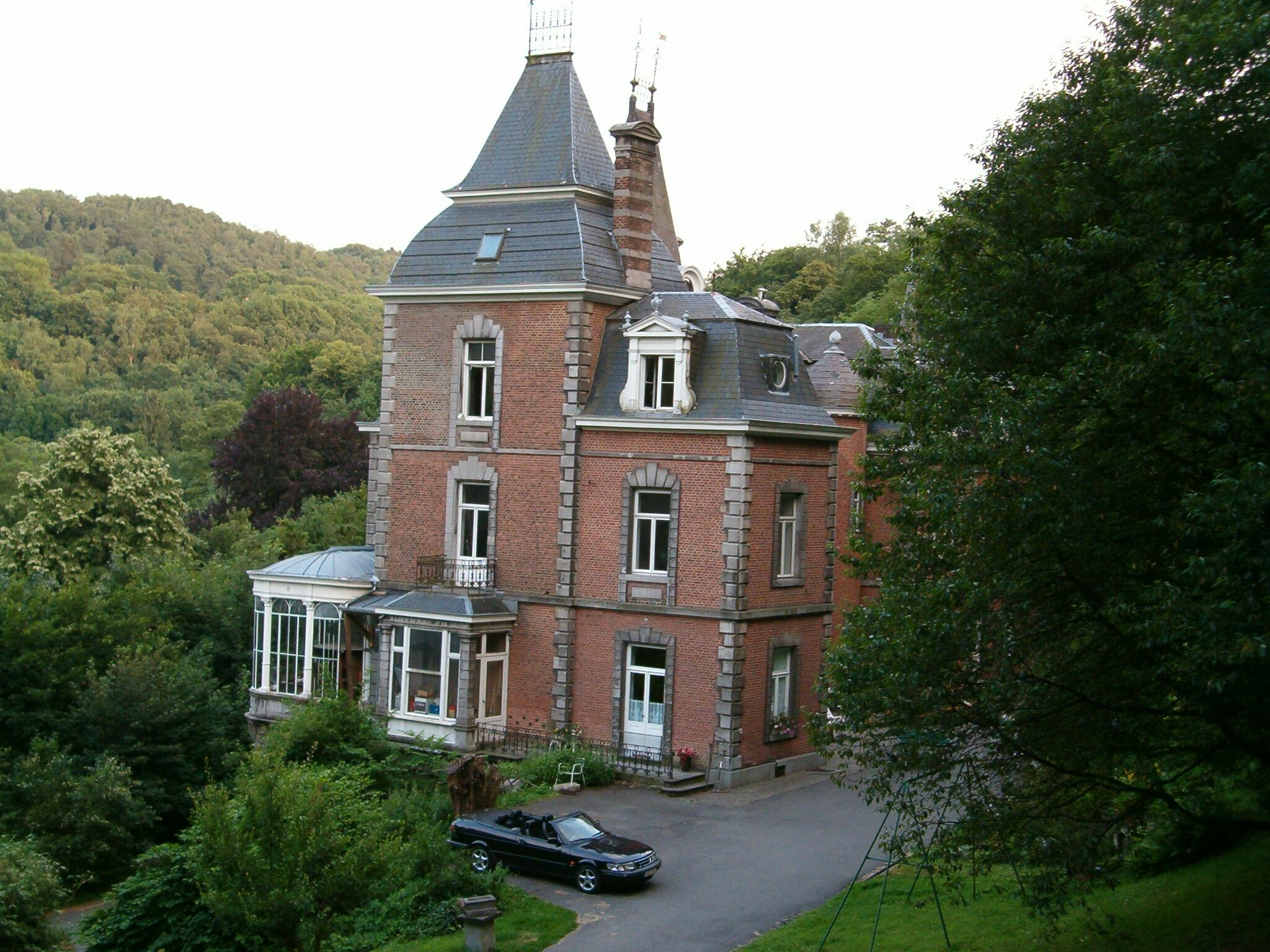 Château des Roches (Trooz-Belgique-Europe)